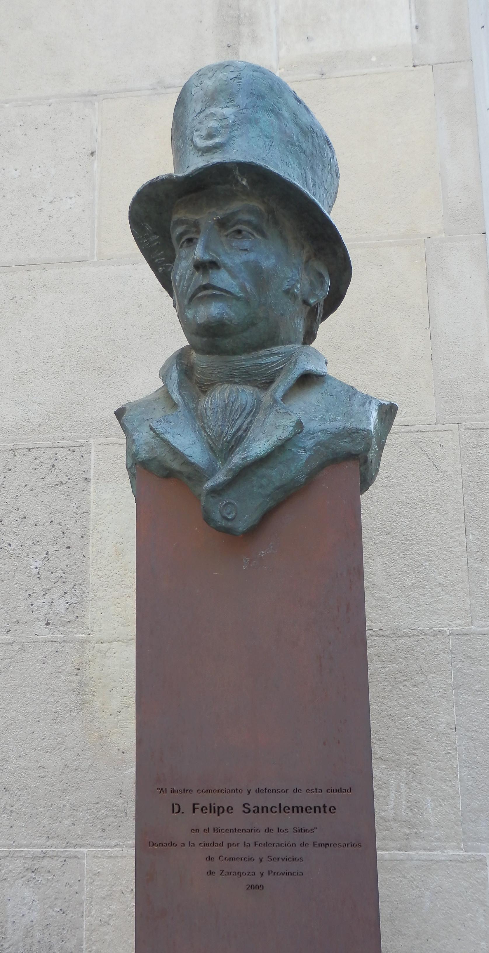 Busto de Felipe Sanclemente y Romeu, situado en el Paseo de la Independencia de Zaragoza.